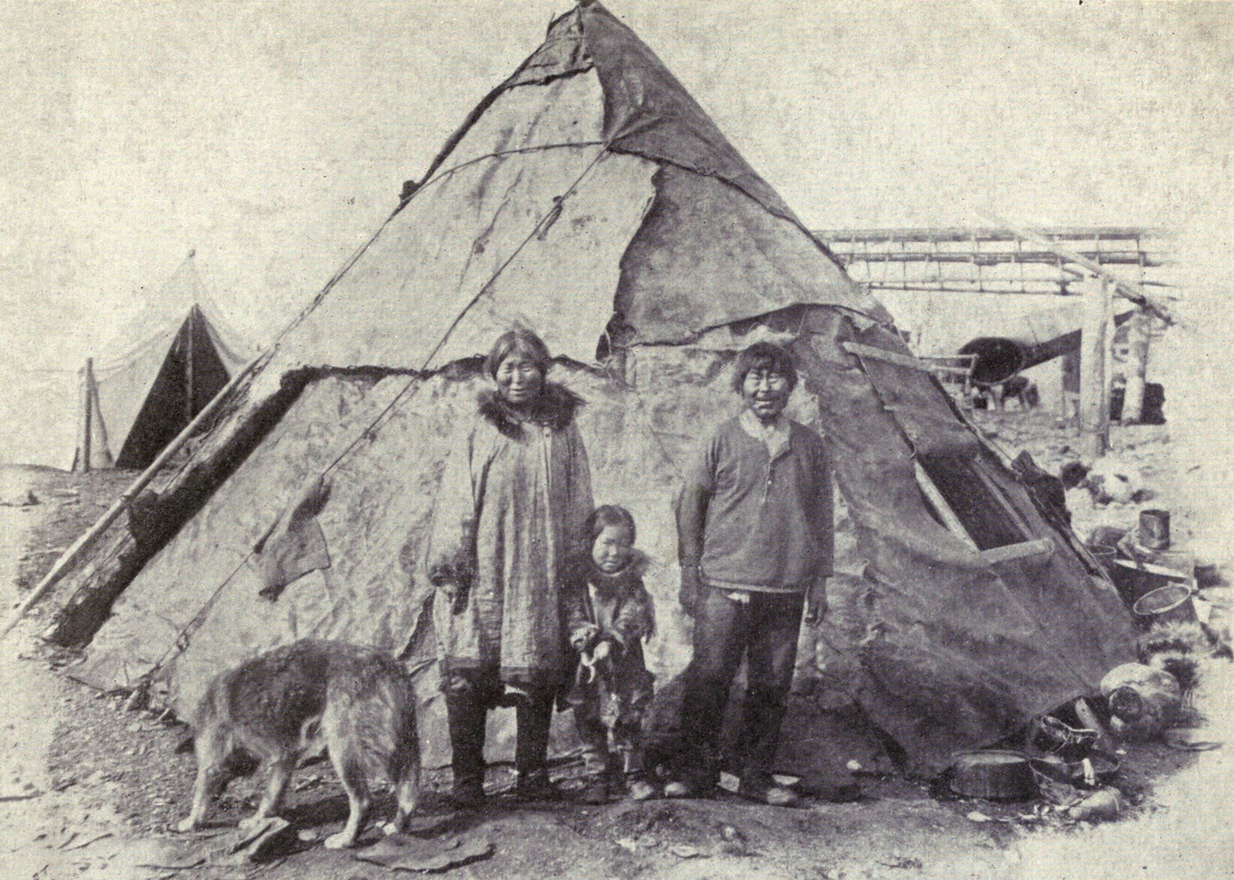 Eskimo family with Malamute